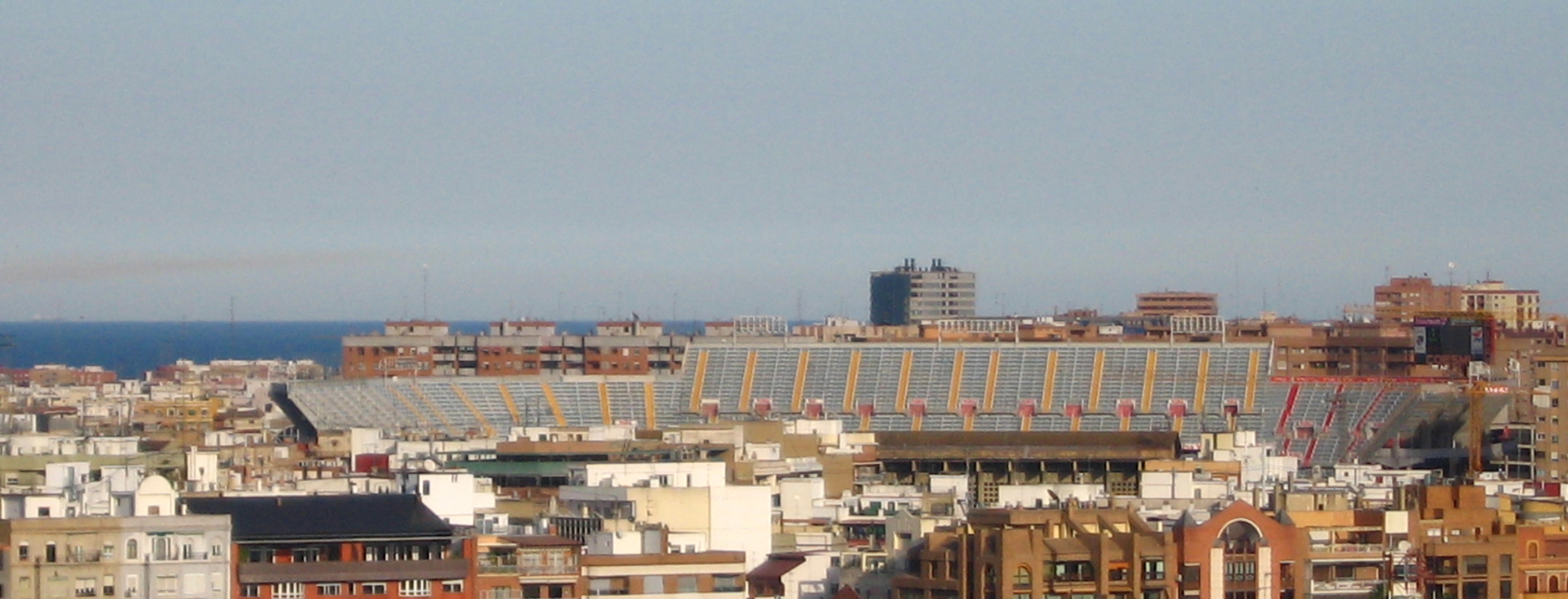 Mestalla i mar de València